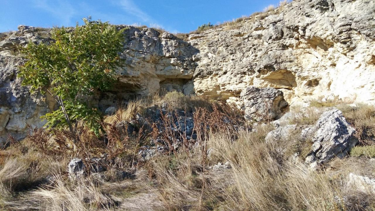 Зефир-Коба (в переводе с тюркского «Зефир-Коба» — «западная пещера», «пещера западных ветров») — комплекс пещерных сооружений (в том числе и пещерного храма), выполненный в два яруса, расположен на восточной границе Гераклейского полуострова, на юго-восточном склоне Сапун-горы, севернее дороги, ведущей из Севастополя в Ялту.